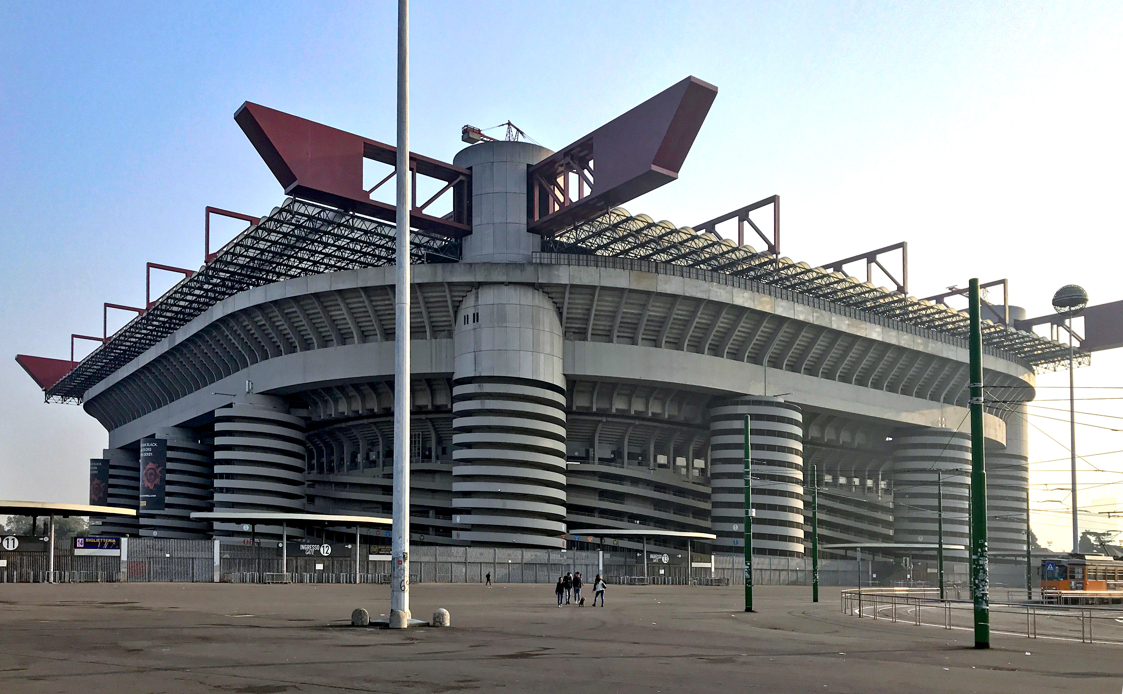 stadio Giuseppe Meazza This is a photo of a monument which is part of cultural heritage of Italy.